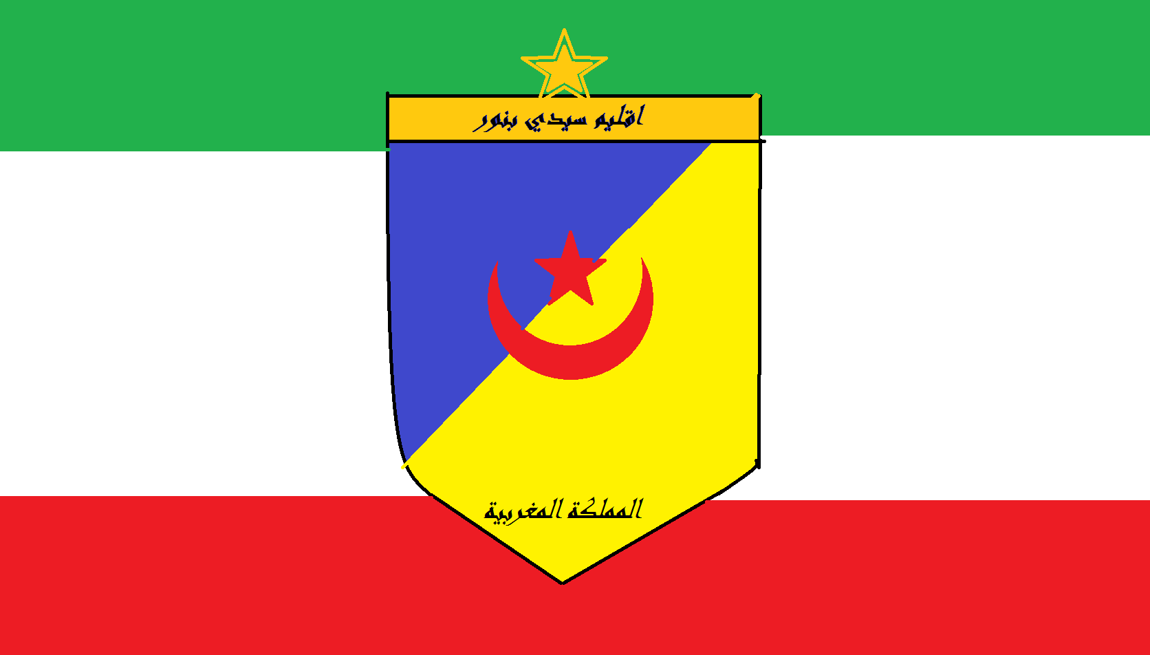 الدارجة: nouveau